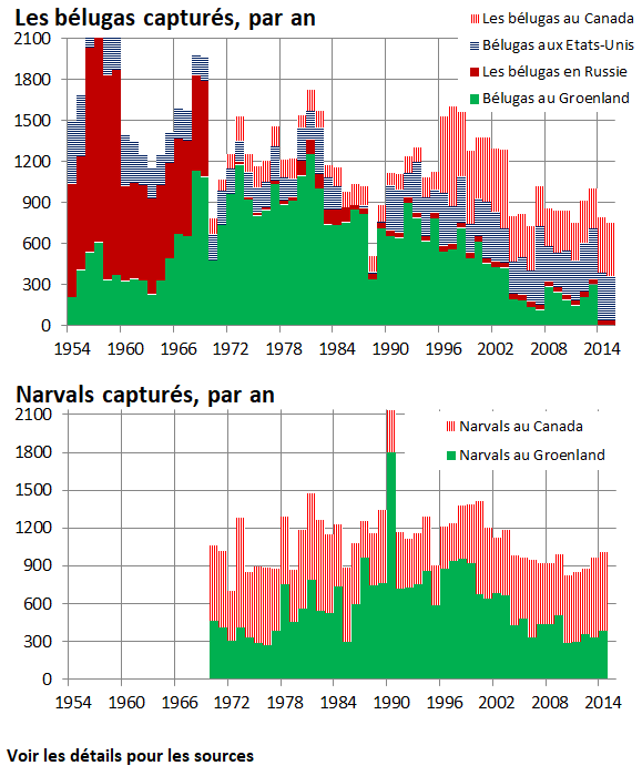 Les bélugas et narvals capturés par des humains. Narvals Les bélugas: Mer de Beaufort: 1960-1984 1970-99 2013-15 2000-2012 Arviat Nunavik: 1996-2002 2003-16 Russie: 1954-1985 citations aux papiers russesNMFS, citation au papier russe Groenland: 1954-2016, M.P. Heide-Jorgensen et E. Garde, 2017-03-01 "Catch statistics for belugas in Greenland 1862 to 2016", NAMMCO/JCNB Joint Working Group on narwhals and belugas, Copenhagen Alaska: 1954-1984 avec les citations antérieures 1987-90 Cook Inlet 1990-2011 2012-2015 +Cook Inlet [1]